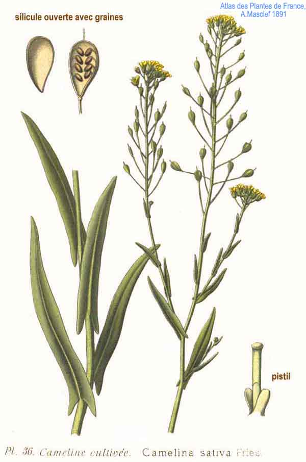 Camelina sativa Fries.